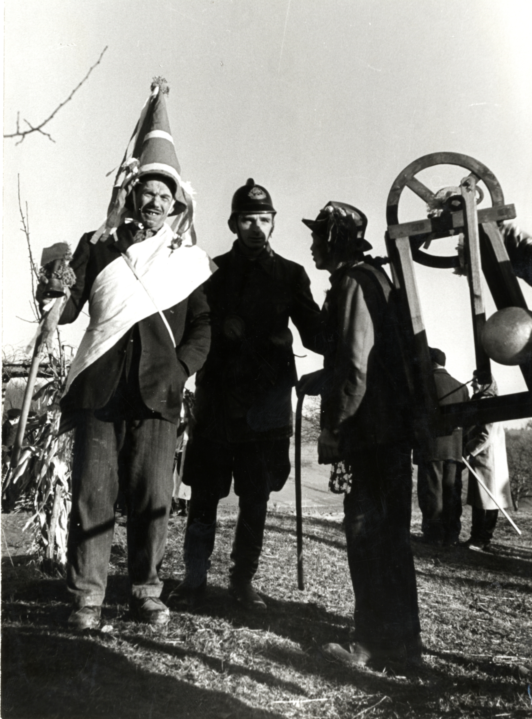 Liki z gostüvanja.